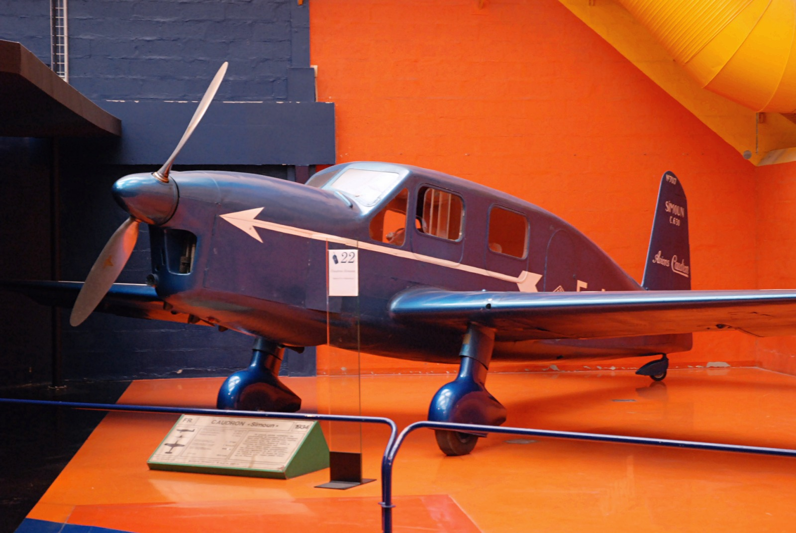 Caudron Simoun at Musée de l'Air et de l'Espace